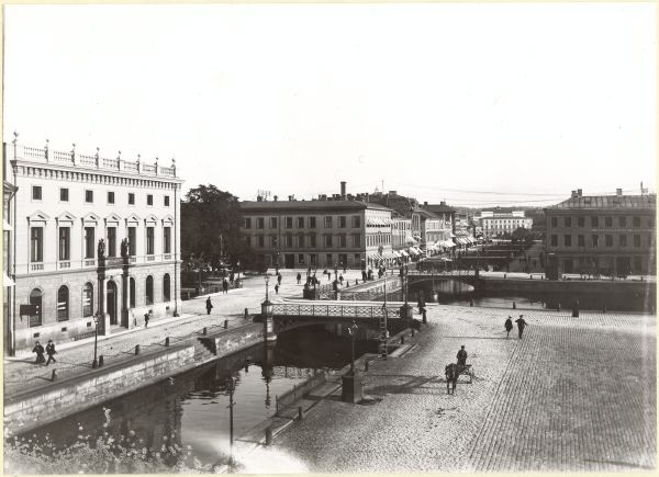 gata - avbildad Östra Hamngatan; Södra Hamngatan; Norra Hamngatan plats - avbildad Östra Hamnkanalen; Stora Hamnkanalen; Brunnsparken plats - utsikt från Gustaf Adolfs Torg [åt söder] Bron närmast i bild är Norra Hamngatubron.